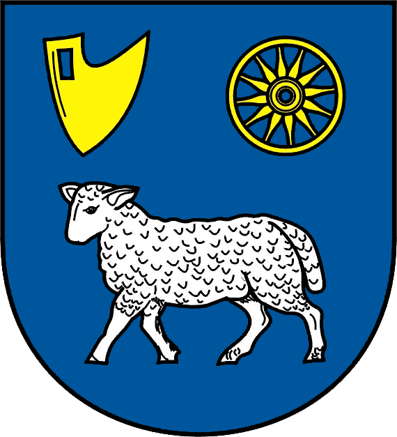 znak obce